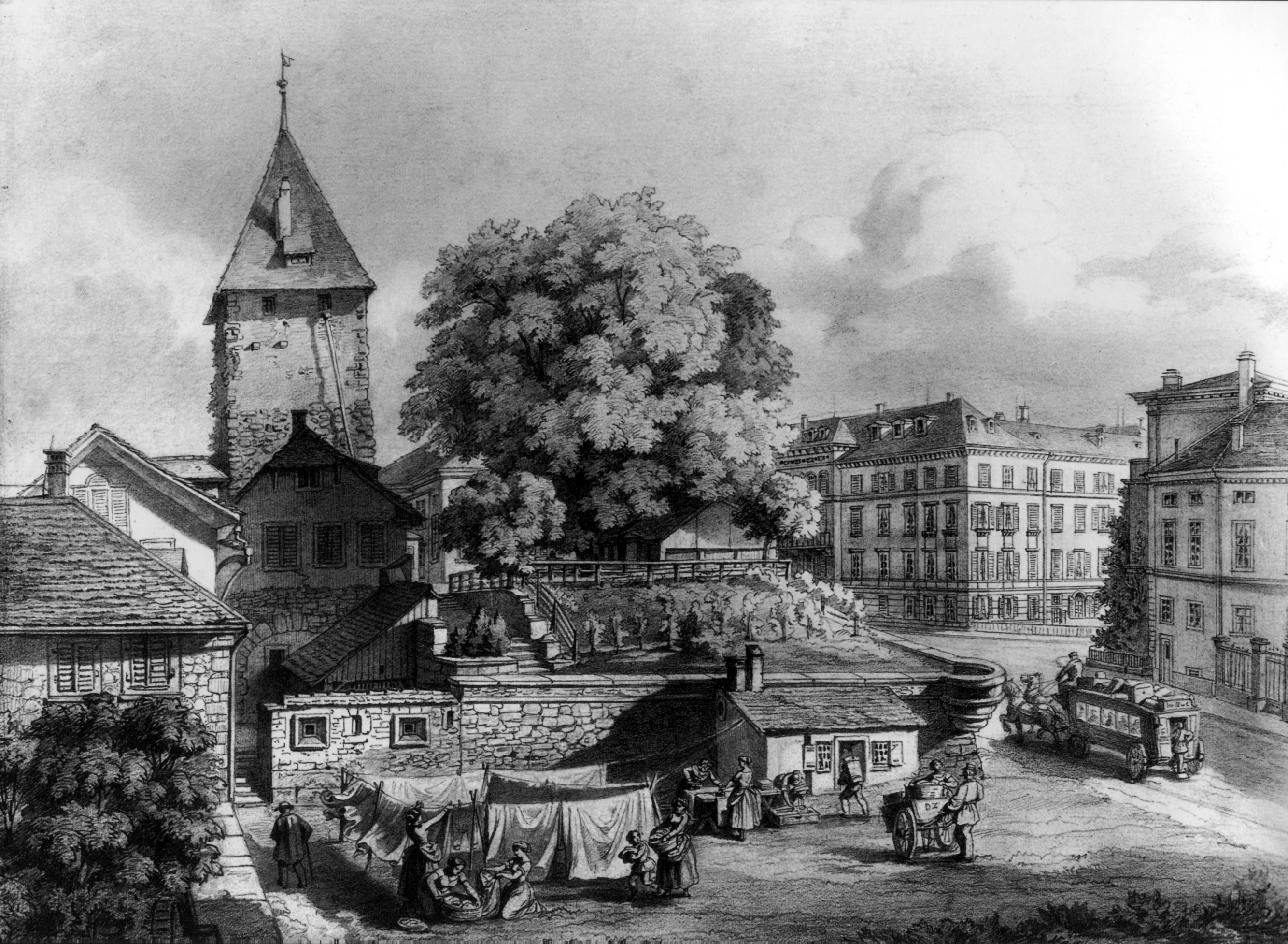 Der Kratzturm mit dem Restaurant "Baugarten" an der heutigen Kreuzung Bahnhofstrasse / Börsenstrasse um 1871. Rechts das Hotel "Baur au Lac". Abgetragen 1877